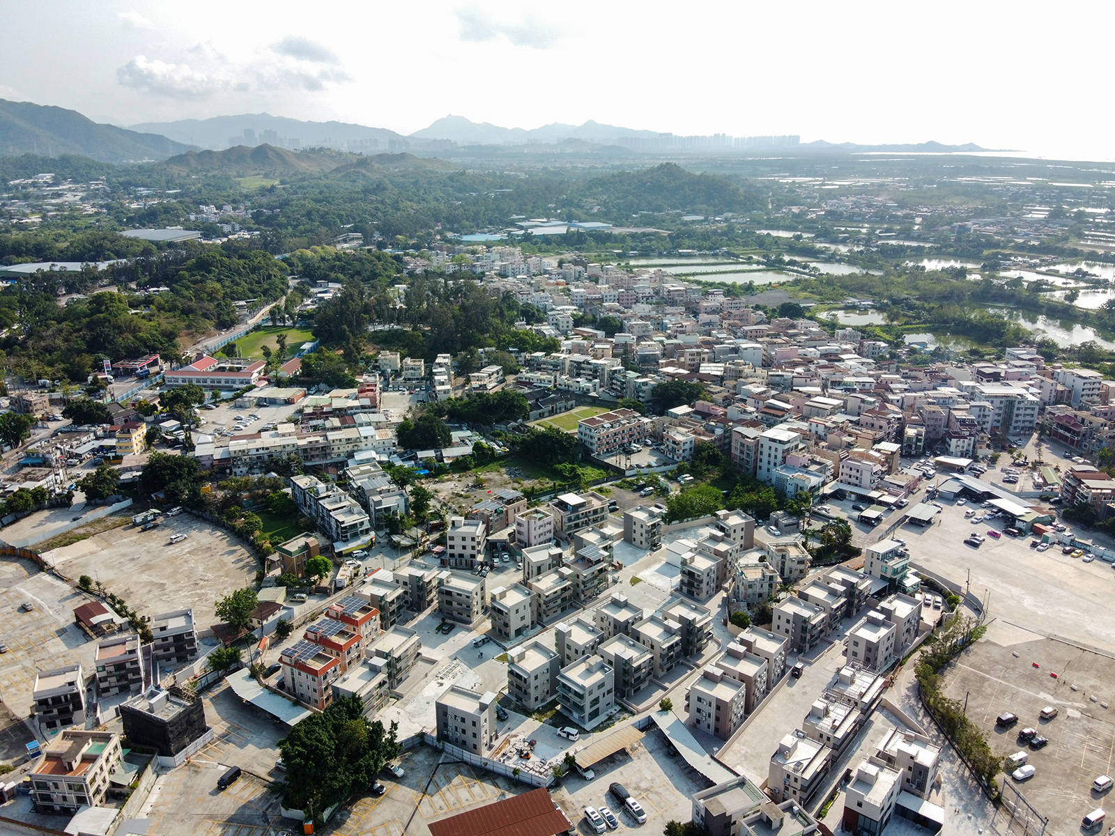 Wing Pin Tsuen